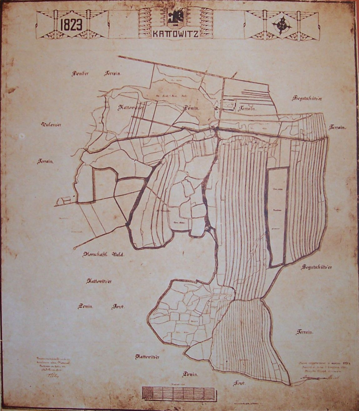 Mapa Katowic z 1823 roku